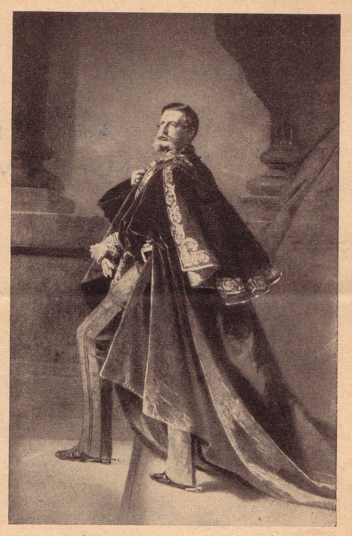 Kronprinz Friedrich Wilhelm, der spätere Kaiser Friedrich III., als Rector magnificentissimus der Albertus-Universität